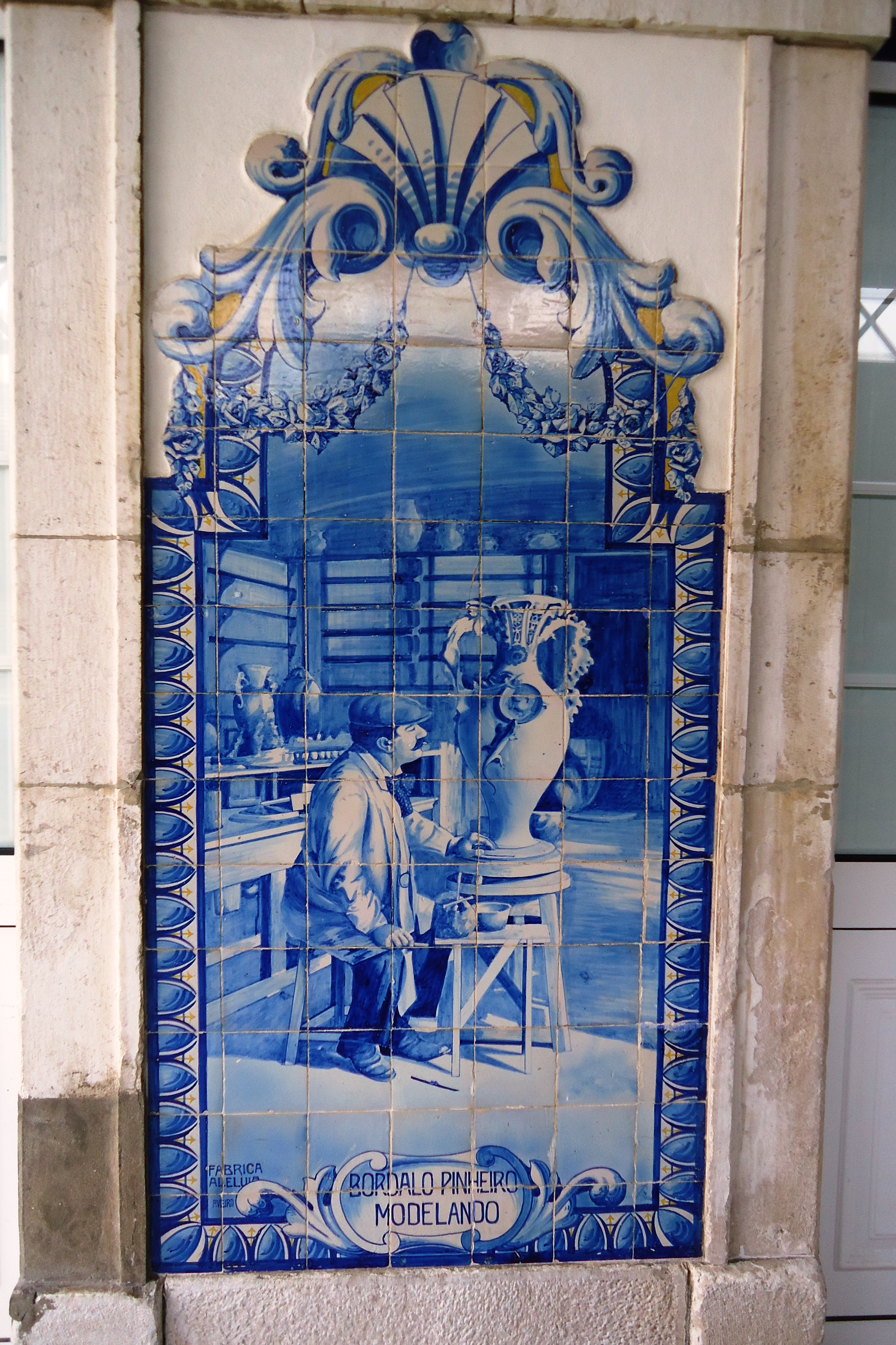 Painel de azulejos "Bordalo Pinheiro Modelando" (Fábrica Aleluia, Aveiro, s.d.) na estação de caminho de ferro de Caldas da Rainha, distrito de Leiria, Portugal.